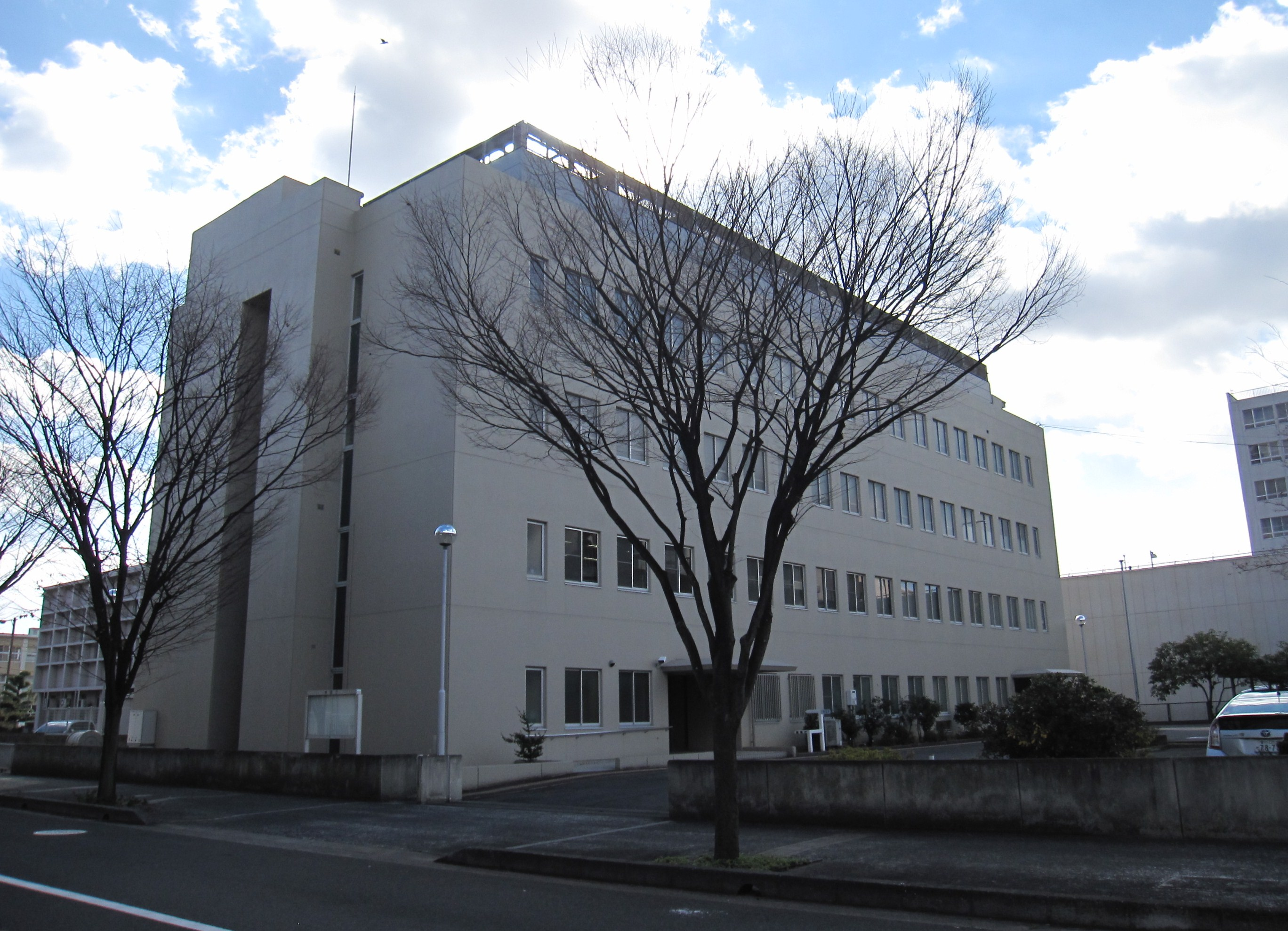 丸亀法務総合庁舎（高松地方検察庁丸亀支部・丸亀区検察庁・高松刑務所丸亀拘置支所）